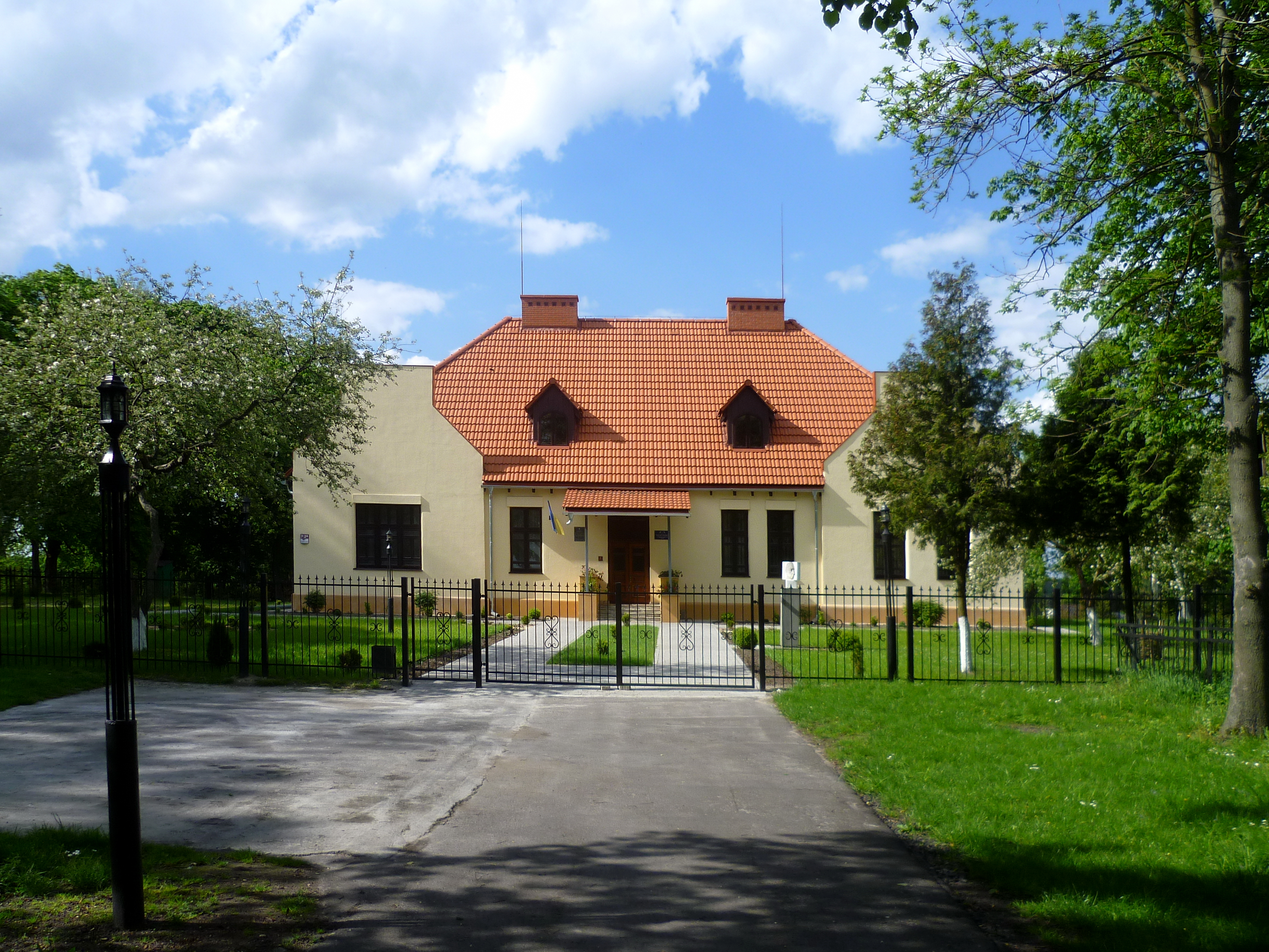 Будинок, у якому жив і працював композитор І.Ф. Стравінський (мур.) (1907-1908 роки) після реконструкції 2013 року - передній вигляд - м.Устилуг (вул.Стравінського 2а) Володимир-Волинський район Волинська область Україна